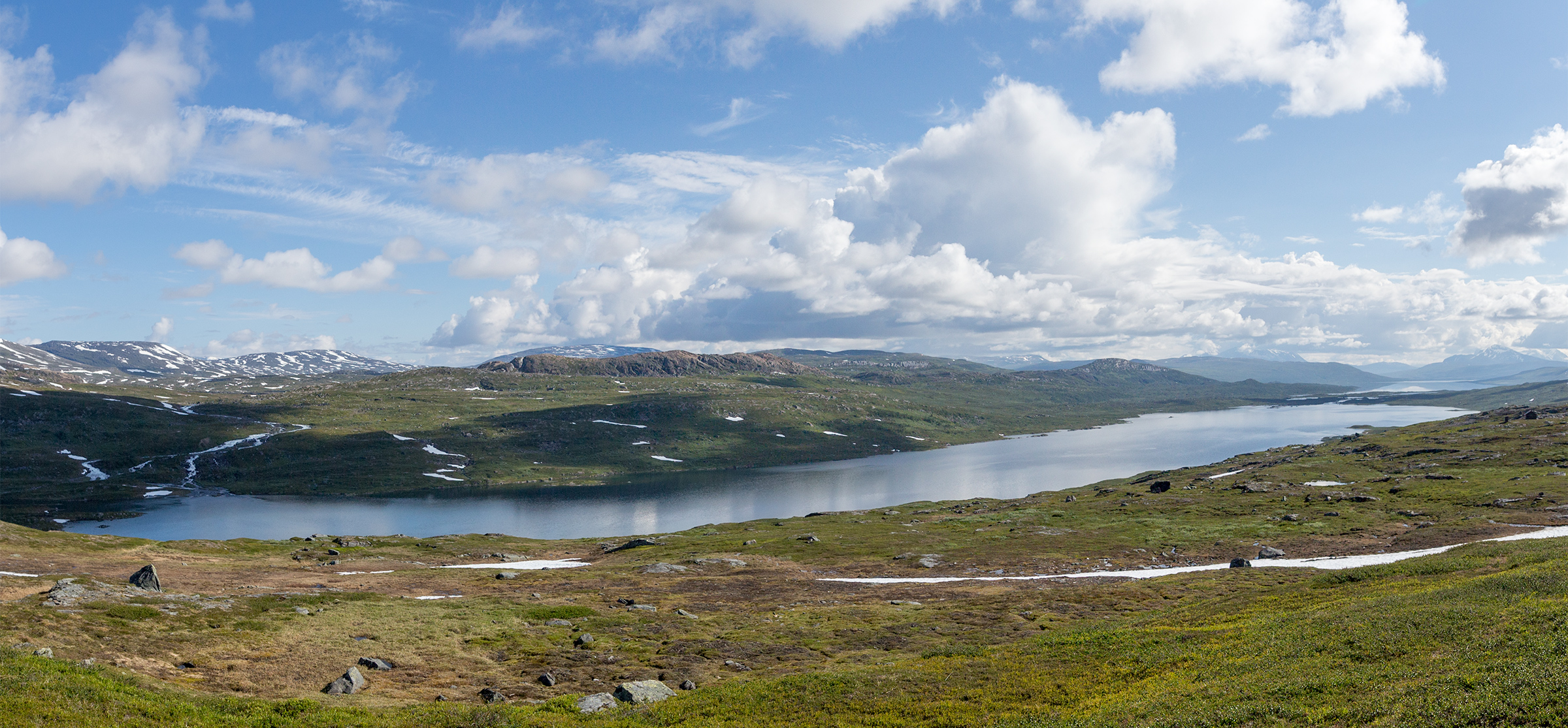 Sjön Njoammeljávrre i västra Padjelanta.